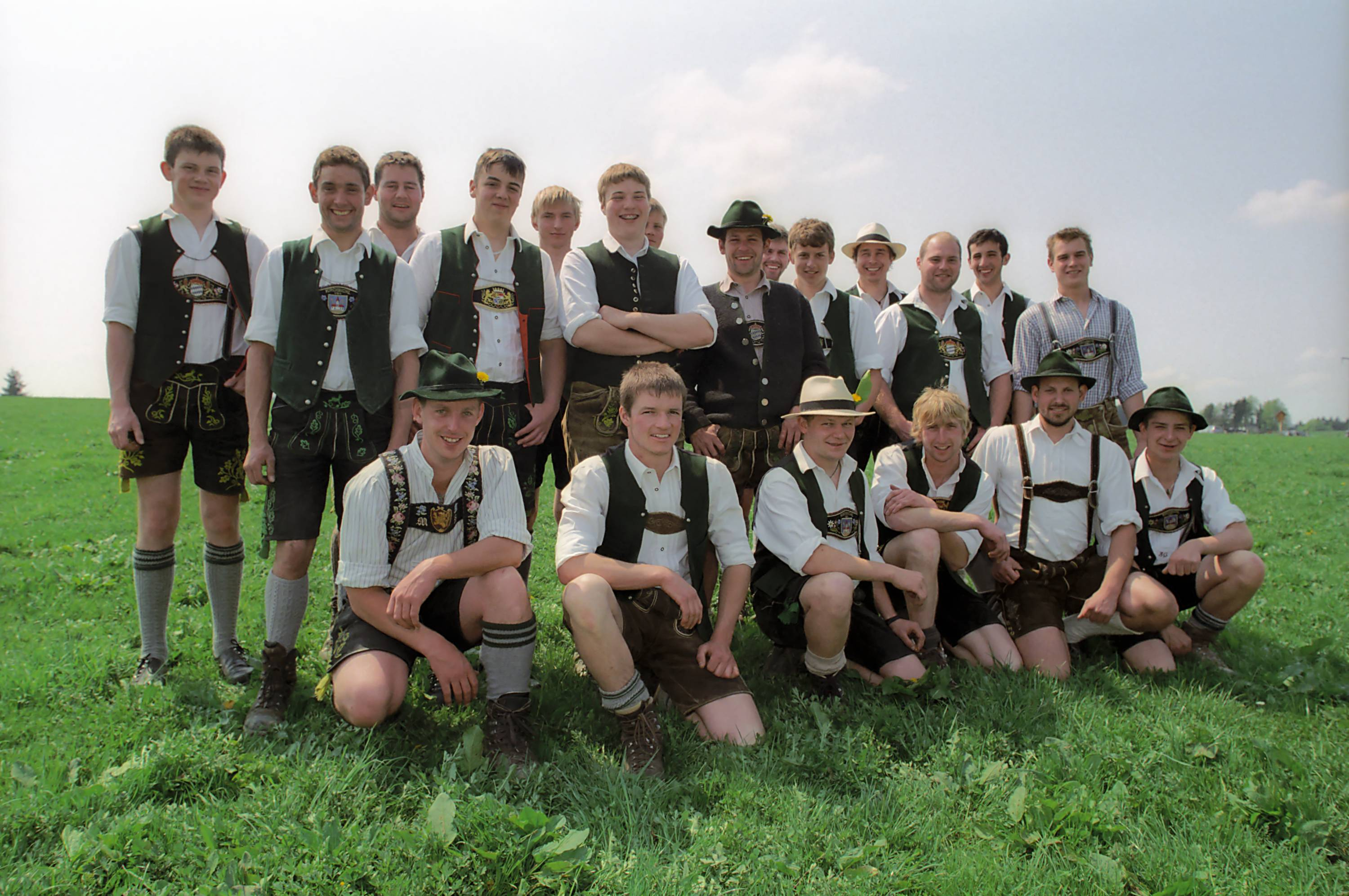 Boarisch: De Burschen vo Ellbach in Lederhosn